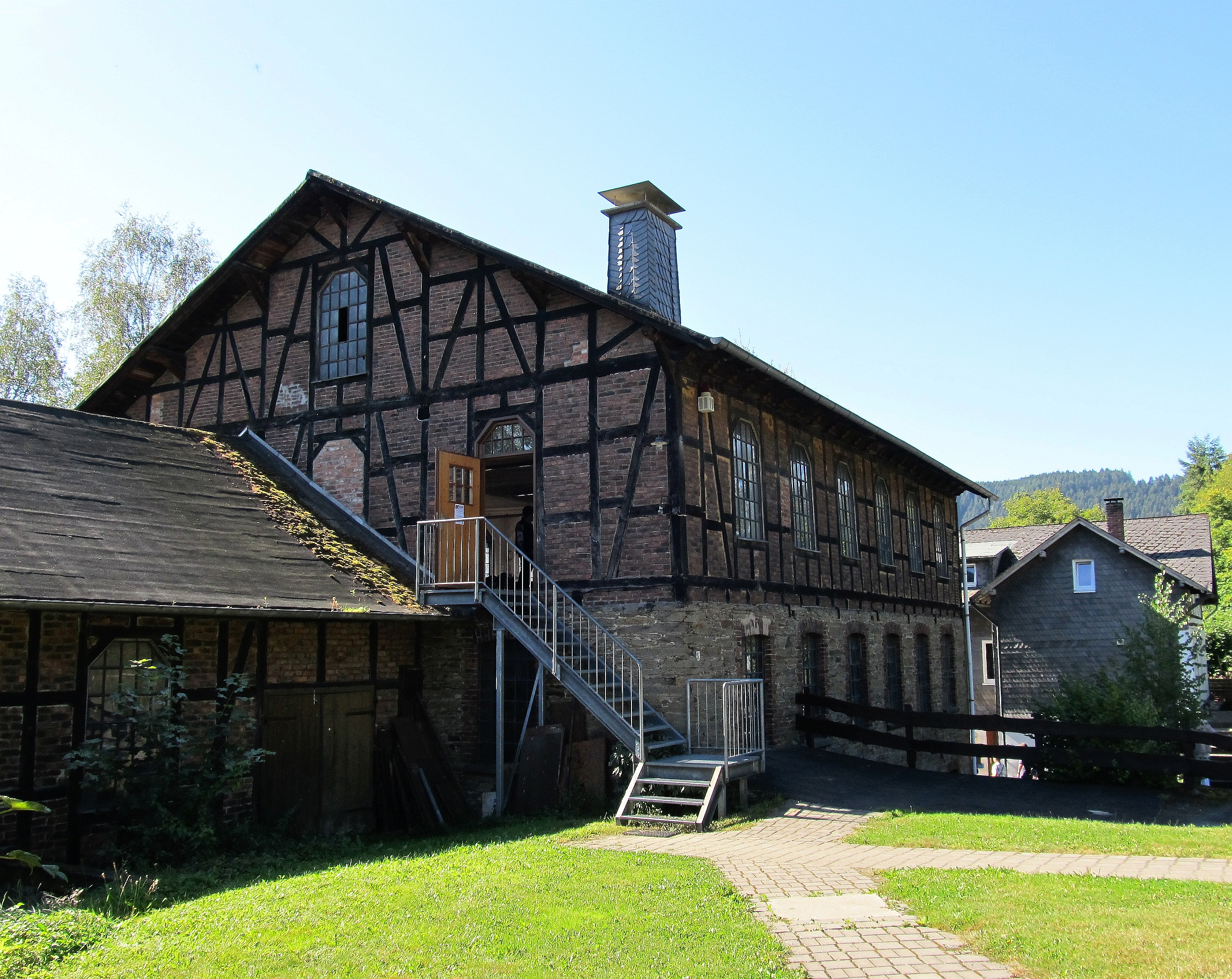 This is a photograph of an architectural monument., no. 110 Besteckfabrik Hesse (heute ein Museum). Das Gebäude wurde 1865 errichtet und beherbergte ursprünglich eine Wollspinnerei. In der Zeit von 1938 bis 1982 stellte die Carl Hesse KG Fleckenberg Besteck her.